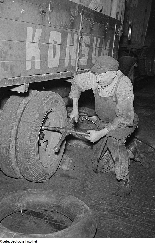 Original image description from the Deutsche FotothekKraftfahrzeugschlosser bei der Montage von LKW-Reifen